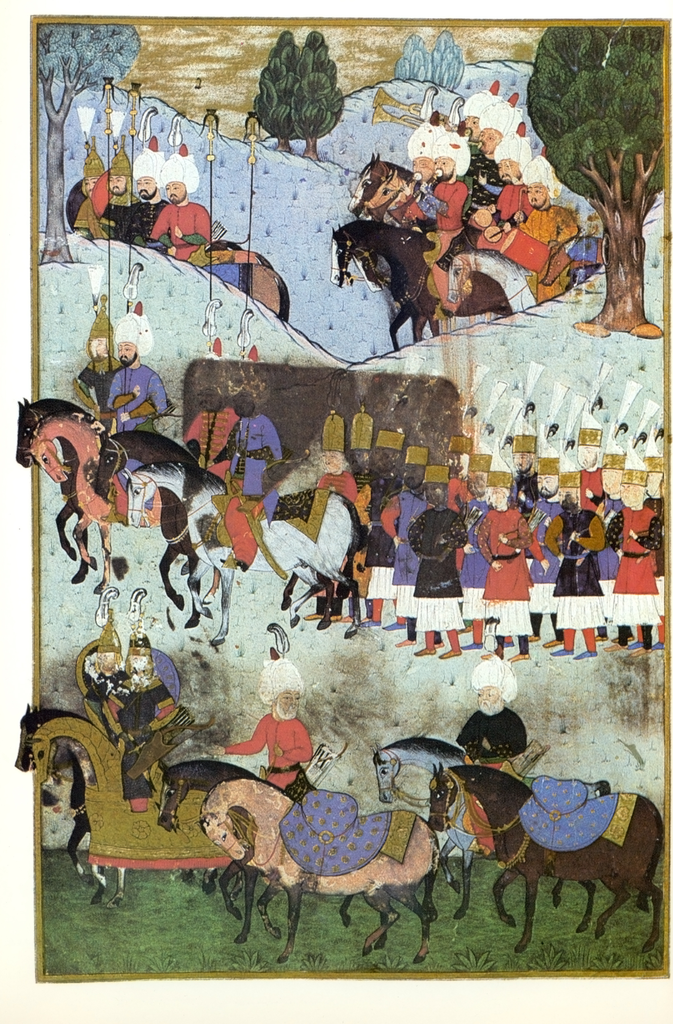 double miniature